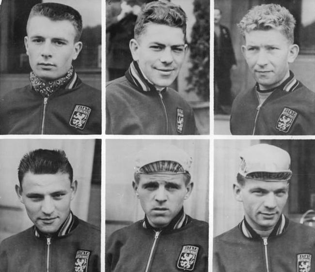 Friedensfahrt, Mannschaft aus Belgien Zentralbild Wendorf 2.5.1960 - Die Teilnehmer Belgiens an der XIII. Internationalen Friedensfahrt 1960. UBz: Obere Reihe vlnr: Basyens, Covens, Clies. Untere Reihe vlnr: Deiamaye, Durnez und Vandenberghen.